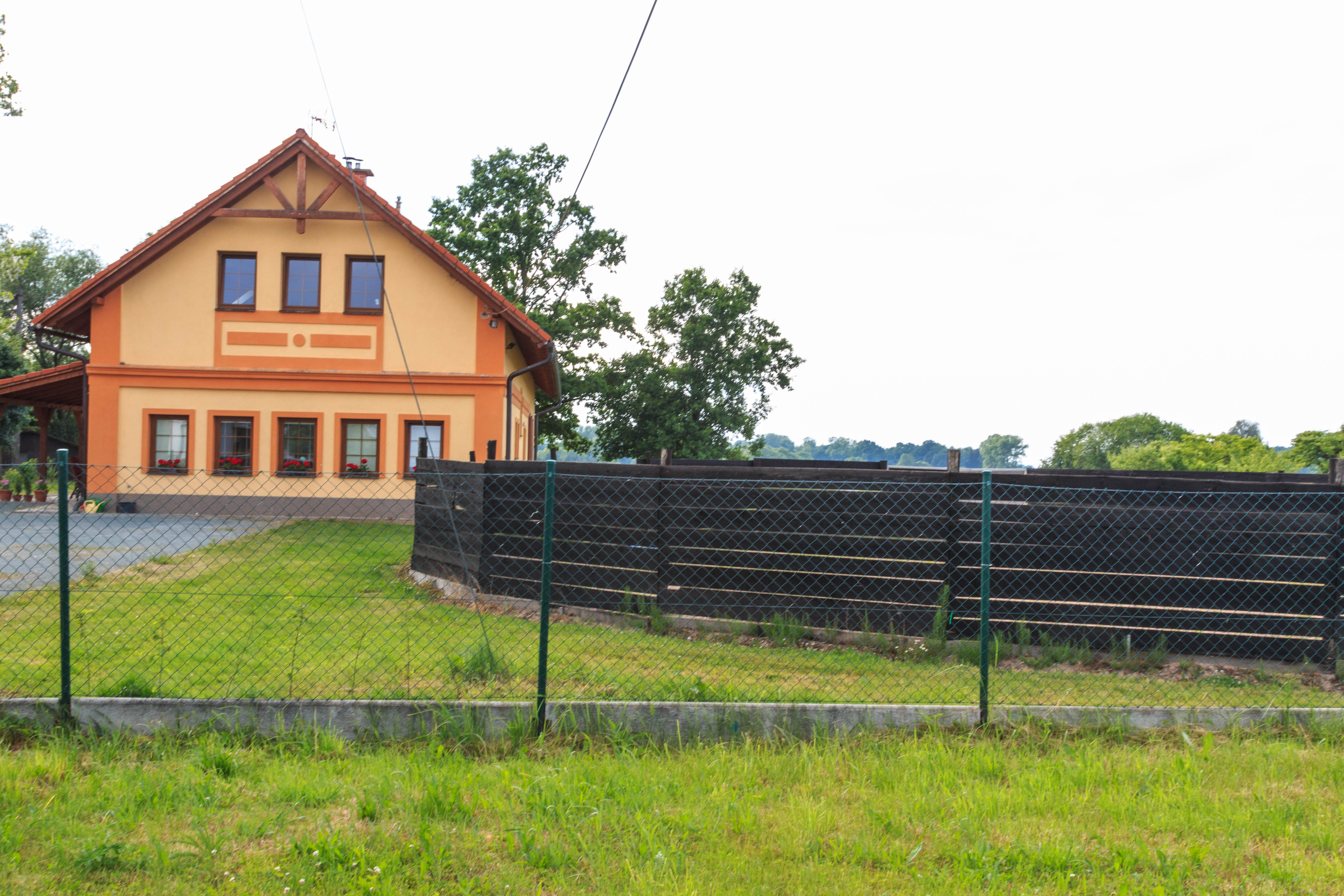 Petrovičky čp. 12